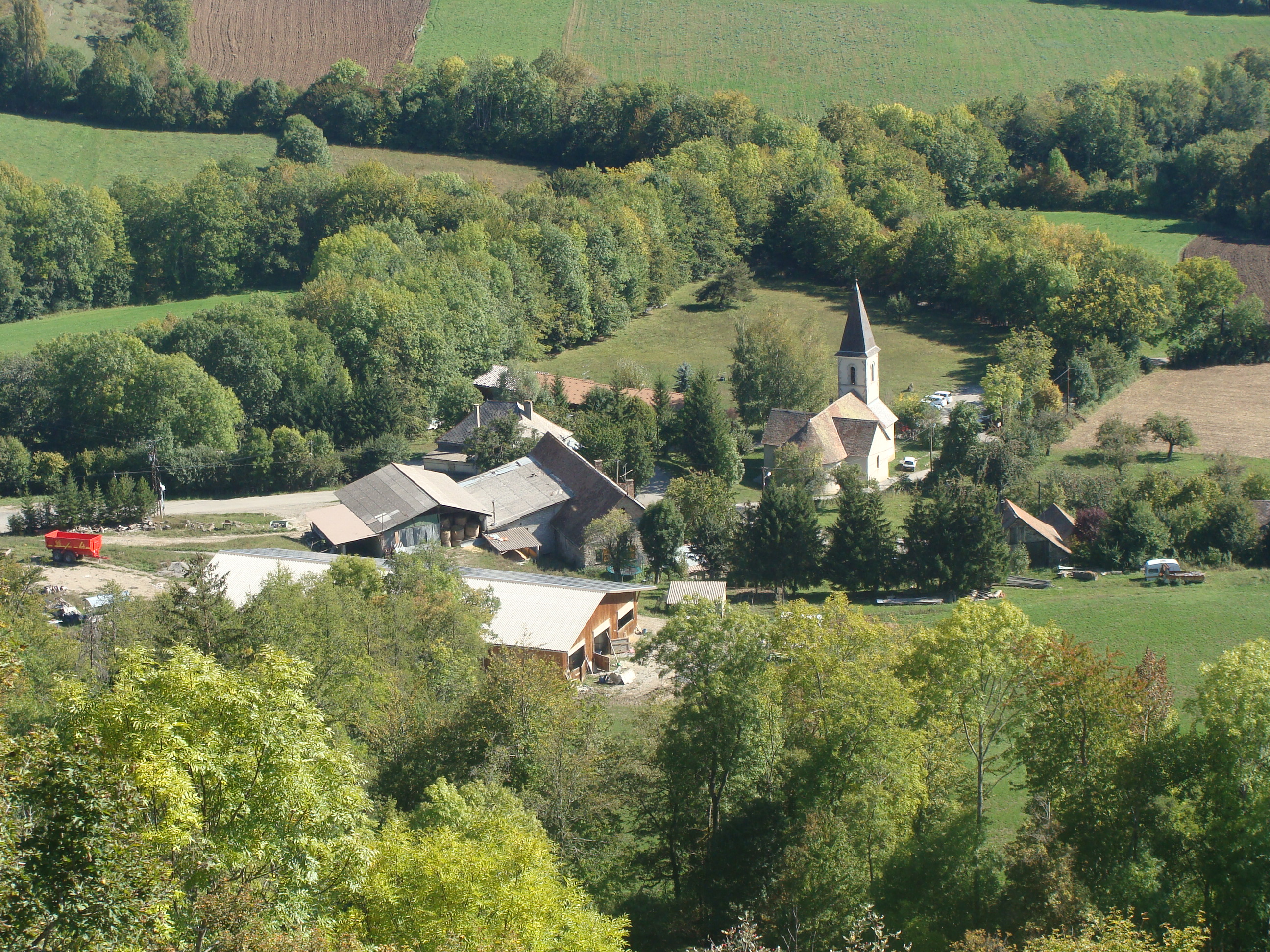 Le hameau des Gentillons, siège de la mairie-annexe et de l'église de l'ancienne commune de Bénévent-et-Charbillac (Hautes-Alpes).